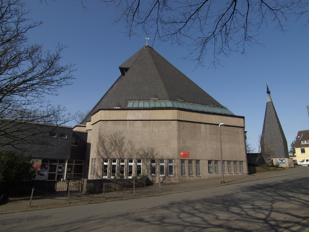 Kath. Kirche Hl. Ewalde in Wuppertal-Cronenberg. Ansicht von der Straße Neukuchhausen.